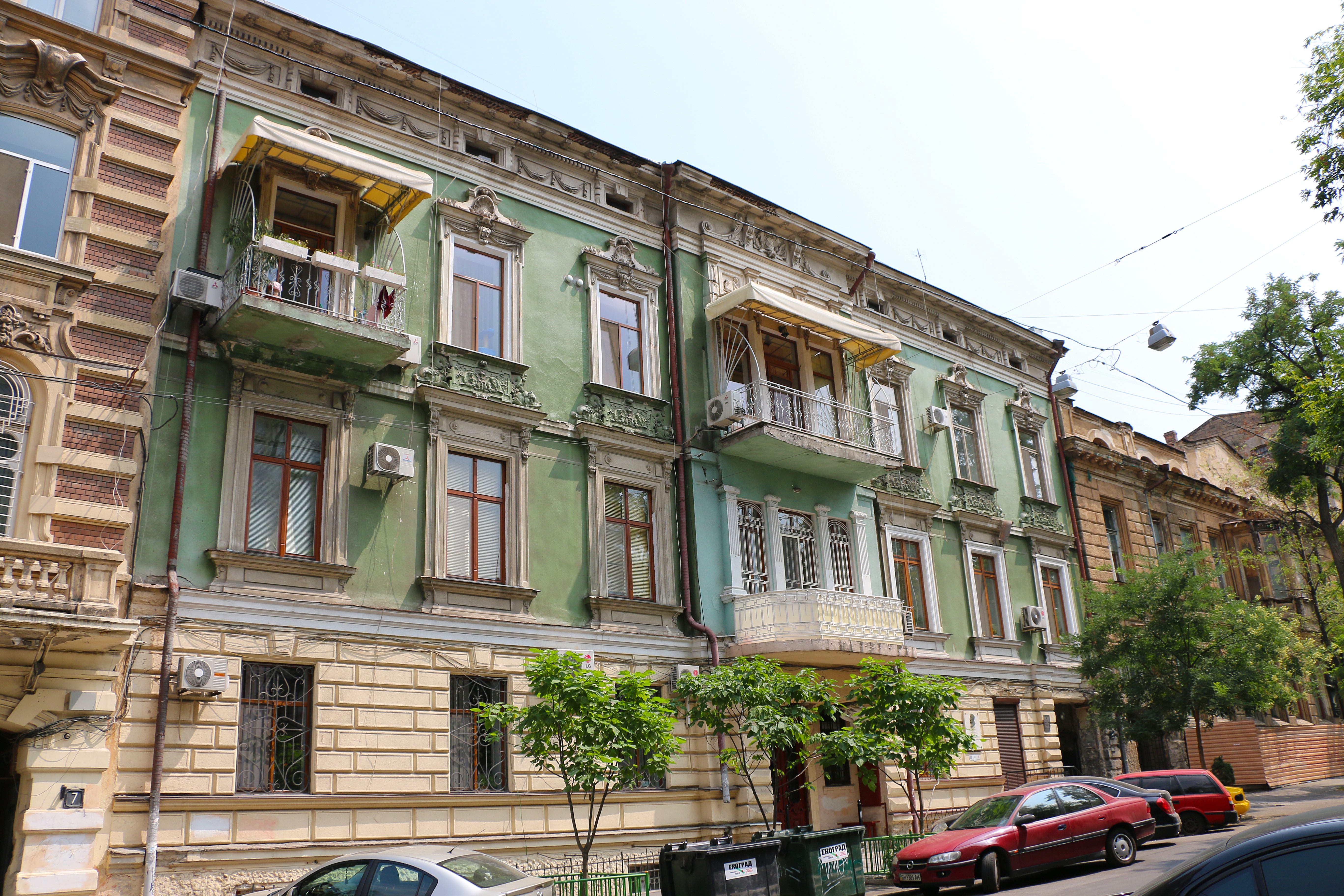 Будинок житловий Шемякіна, в якому жили:В.П. Філатов - вчений-офтальмолог, академік;С.С. Головін - професор-офтальмолог; Є.А. Шевальов - вчений-психіатр;І.І. Іванов - історик і літературний критик, професор;- А.М. Агаронов - професор, Одеса, вул. Гоголя, 9